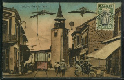 Хасково в бъдещето, българска пощенска картичка от началото на 20 век